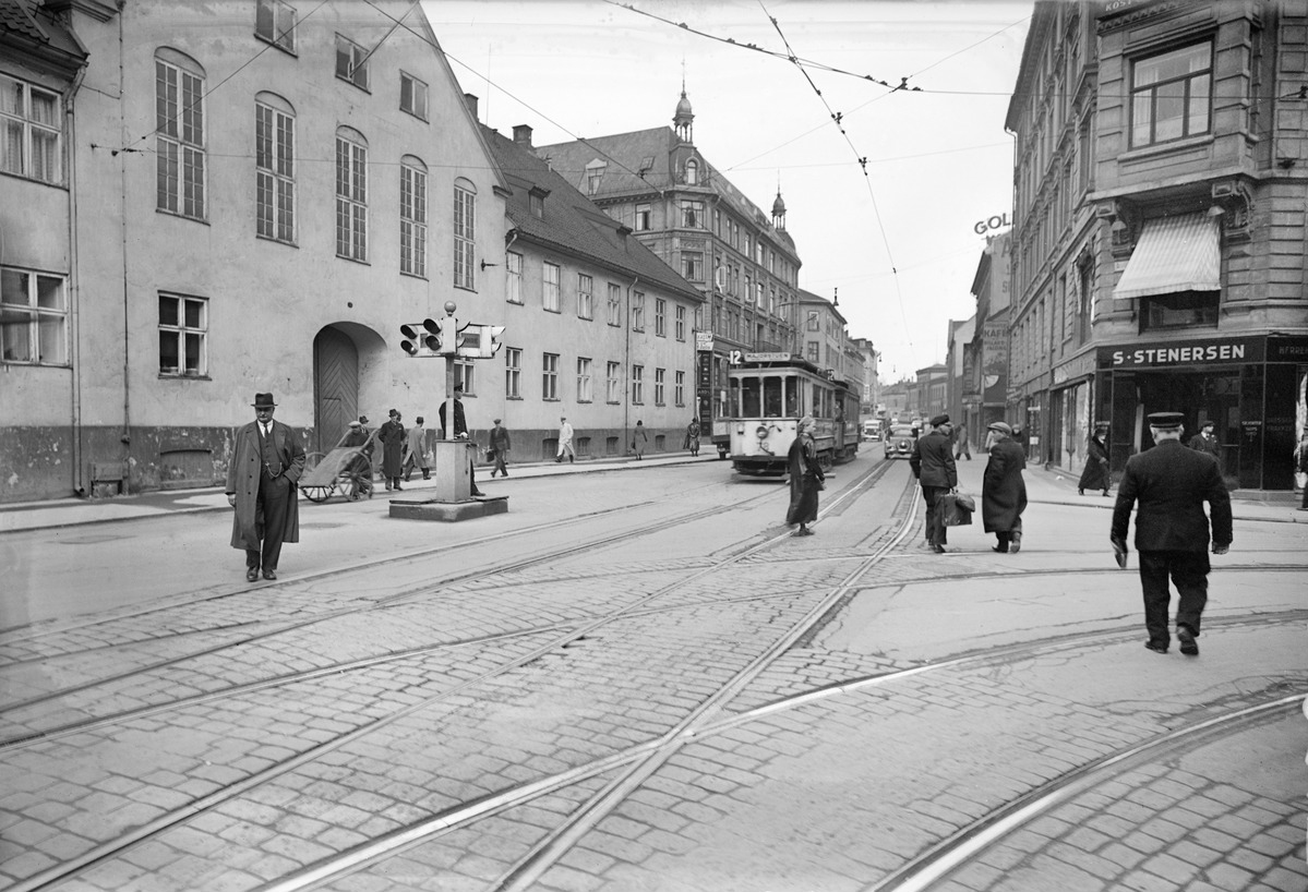 Tukthusets fasade mot Storgata, 1937